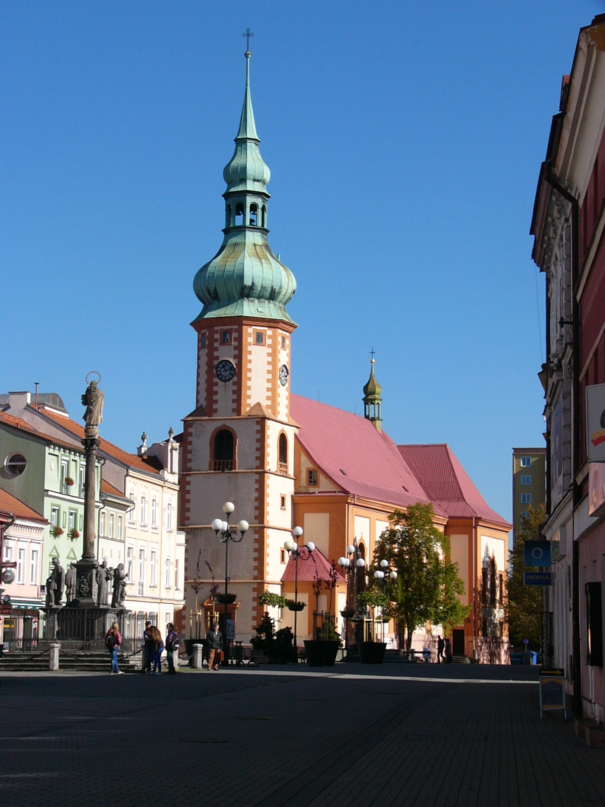 Ansicht von Sokolov